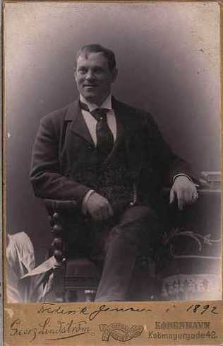 Frederik Jensen (1863-1934), skuespiller